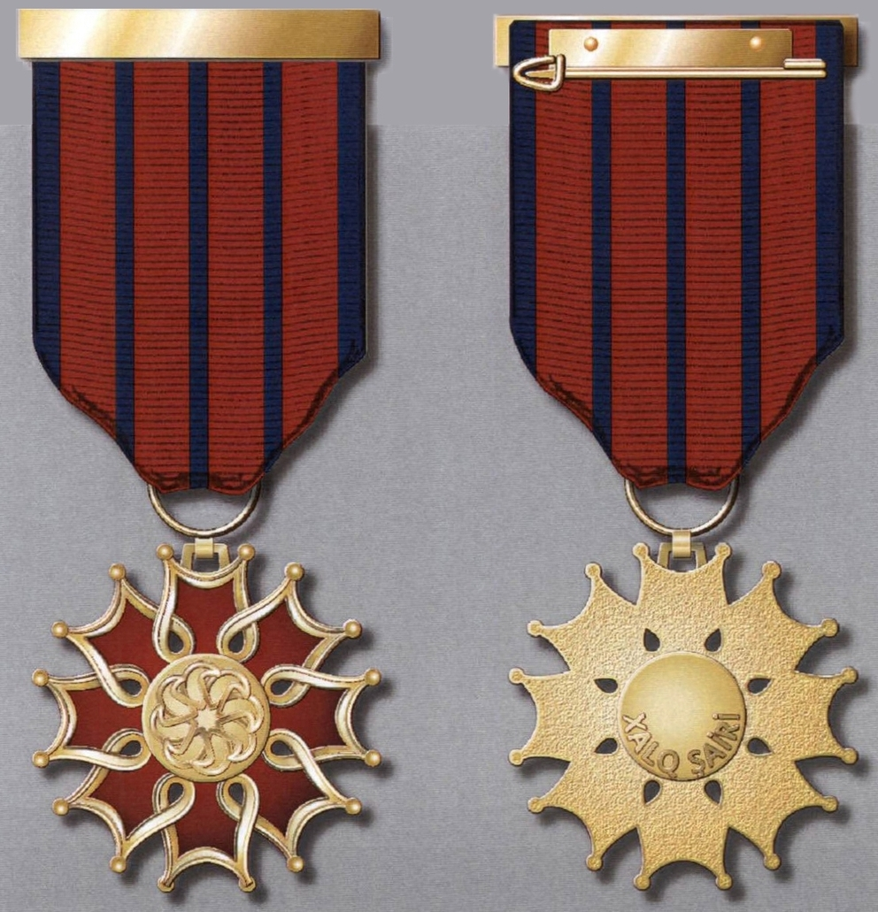 “Xalq şairi” fəxri adının döş nişanı